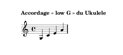 accord en sol grave pour chacune des cordes du ukulélé de haut en bas, de la quatrième à la première corde.